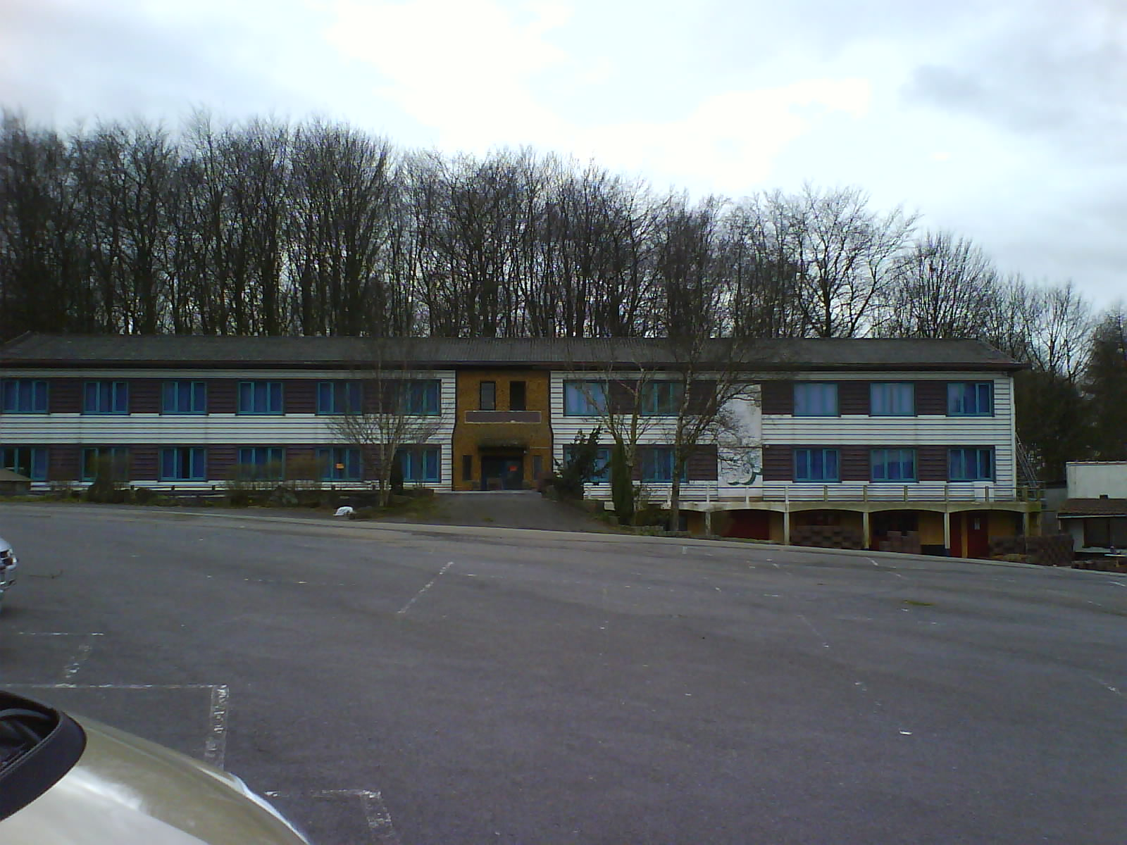 Home Boskant, met ondergrondse fitnesszaal. Telt 48 kamers, met sanitair en alle voorzieningen.